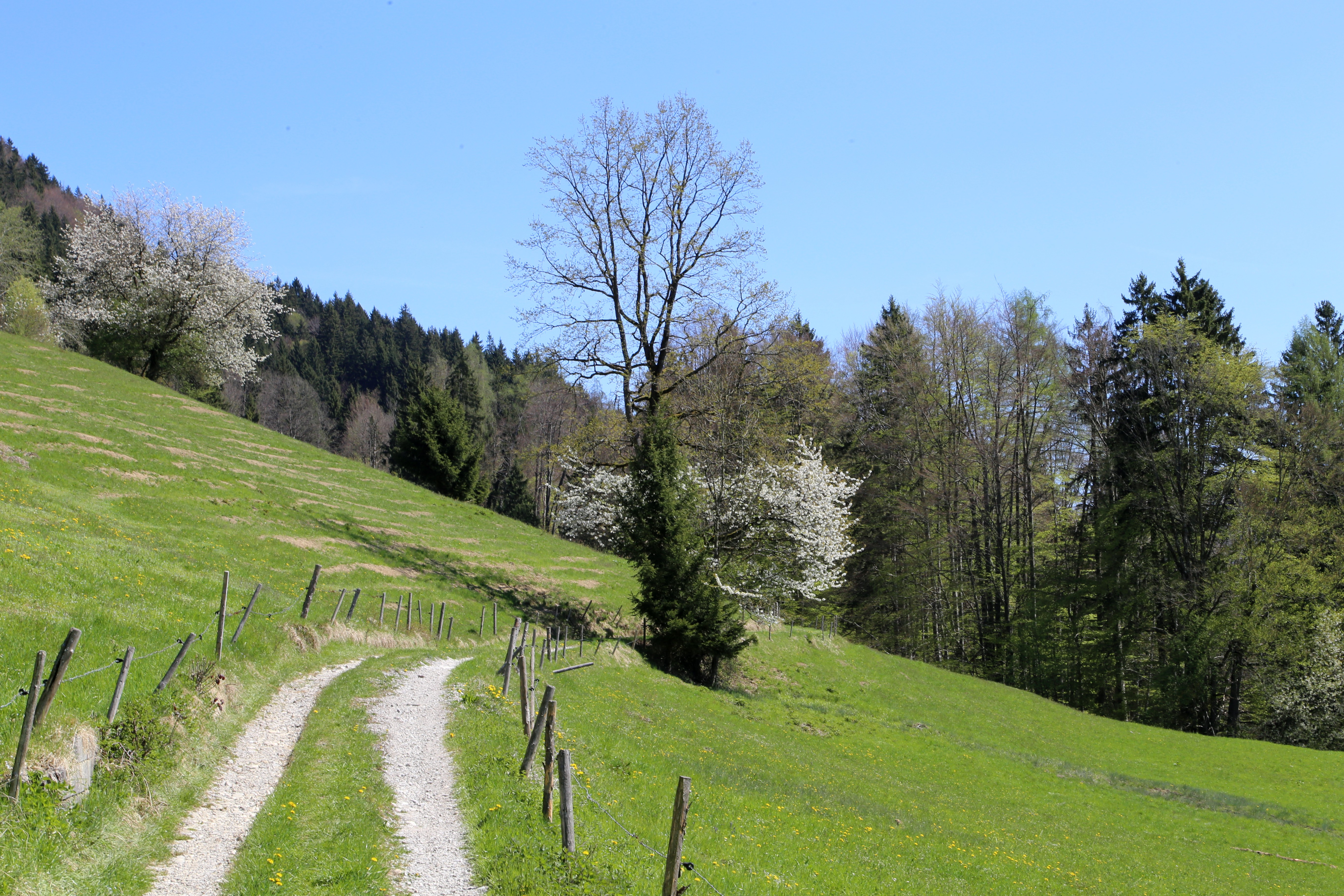 Weg zum Nußlberg, Kiefersfelden